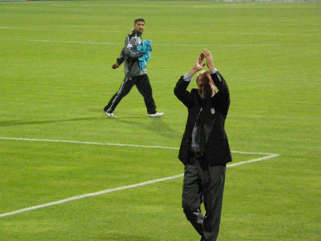 Beşiktaş - SivasSpor maçında tarafımdan çekilmiştir. Mustafa Denizli